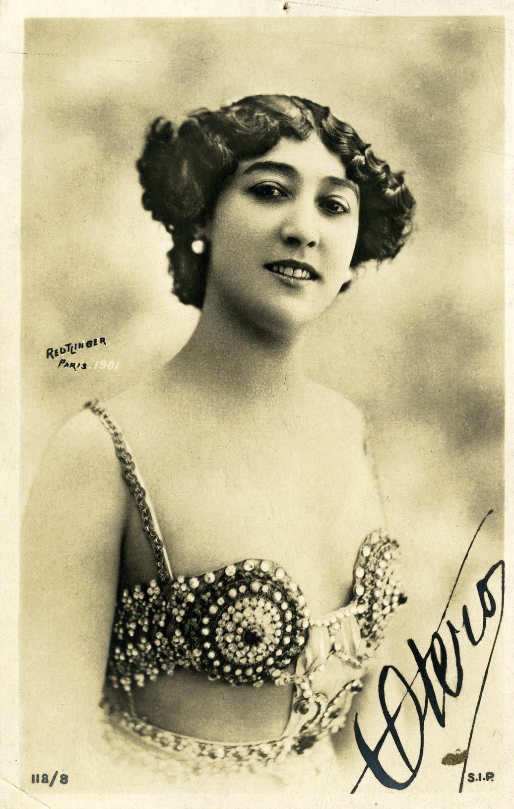 Retrat de La Bella Otero fotografiada per Léopold Reutlinger, signat per ella